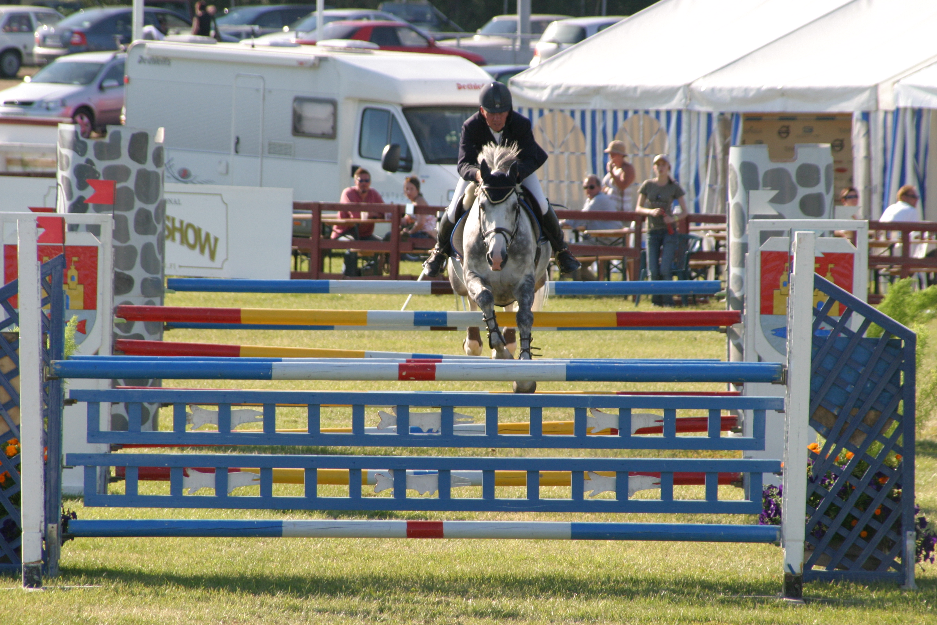 Oulun Pokaali 2006, Finland